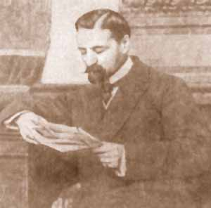 Волконский, Сергей Михайлович